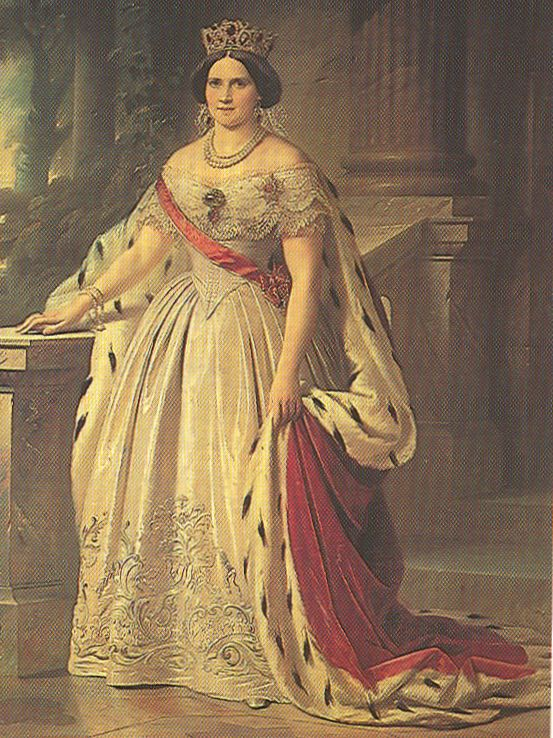 Duchess of Mecklenburg-Schwerin